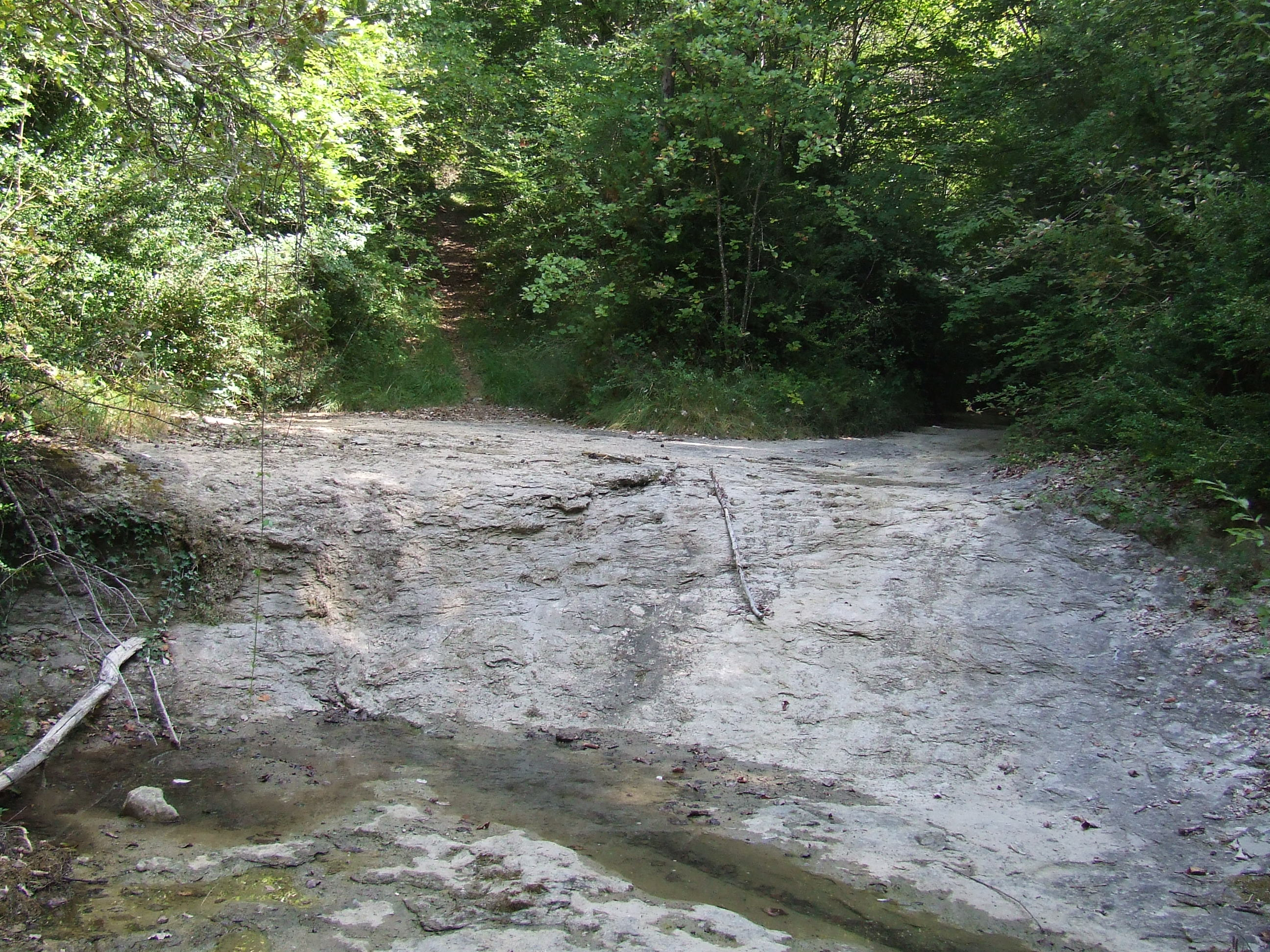 Afluència del torrent del Soler en el de Sauva Negra (Castellcir, Moianès)